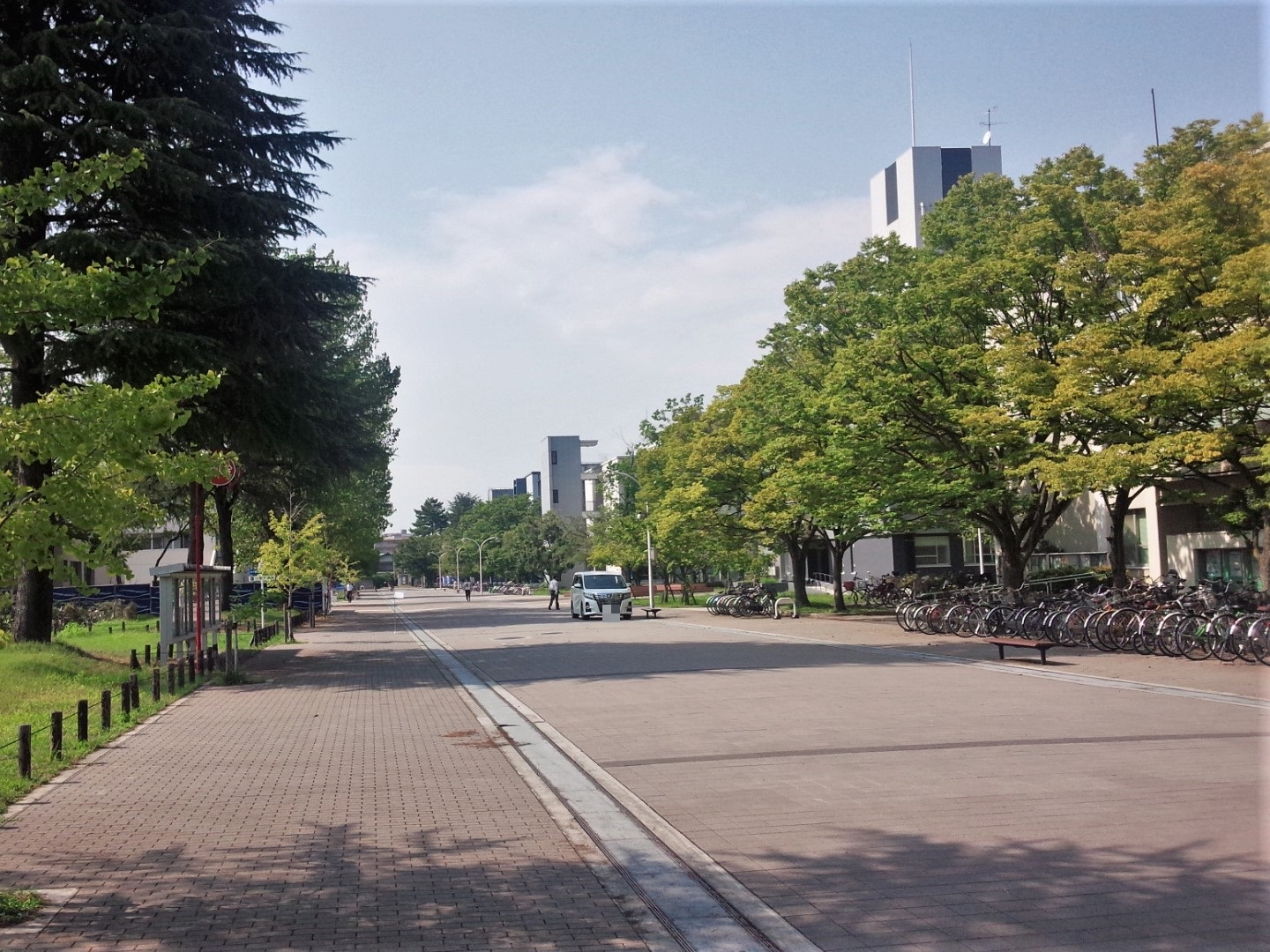 大阪府立大学中百舌鳥キャンパス、キャンパス内の様子（大阪府堺市）